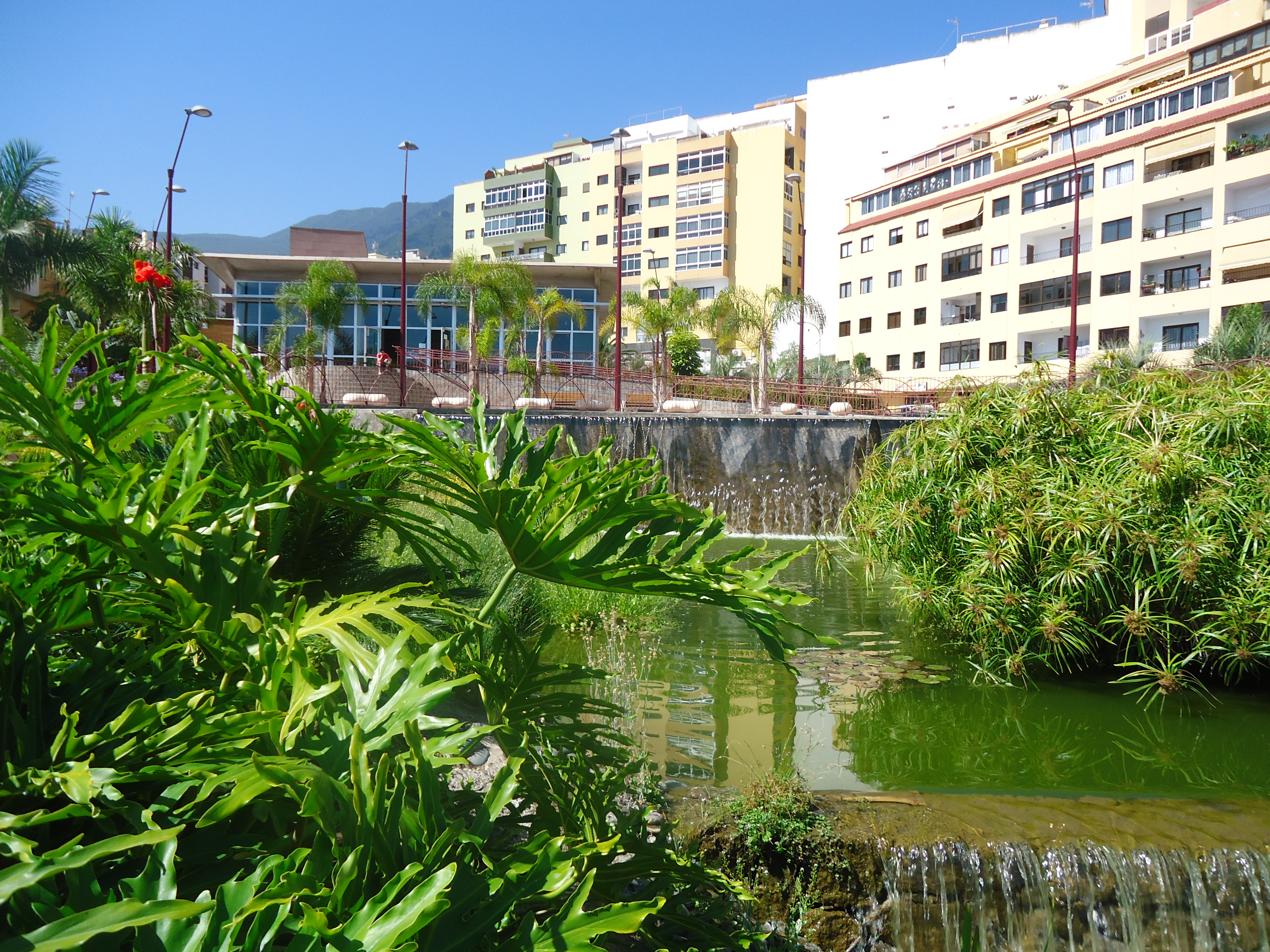 Parque Rafael Yanes en San Agustín, Los Realejos.